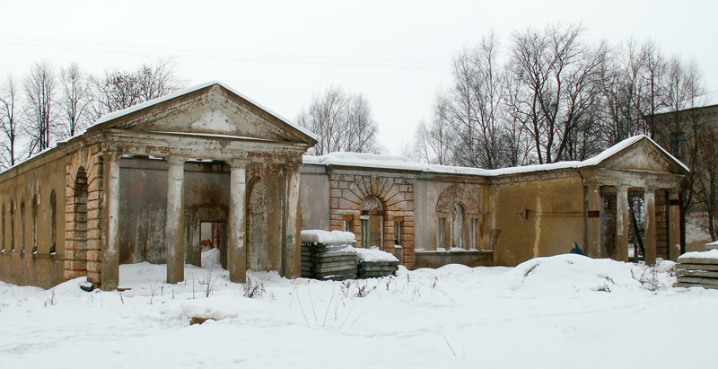 Вичуга: Особняк для служащих, 1910-е, арх. И. Жолтовский.